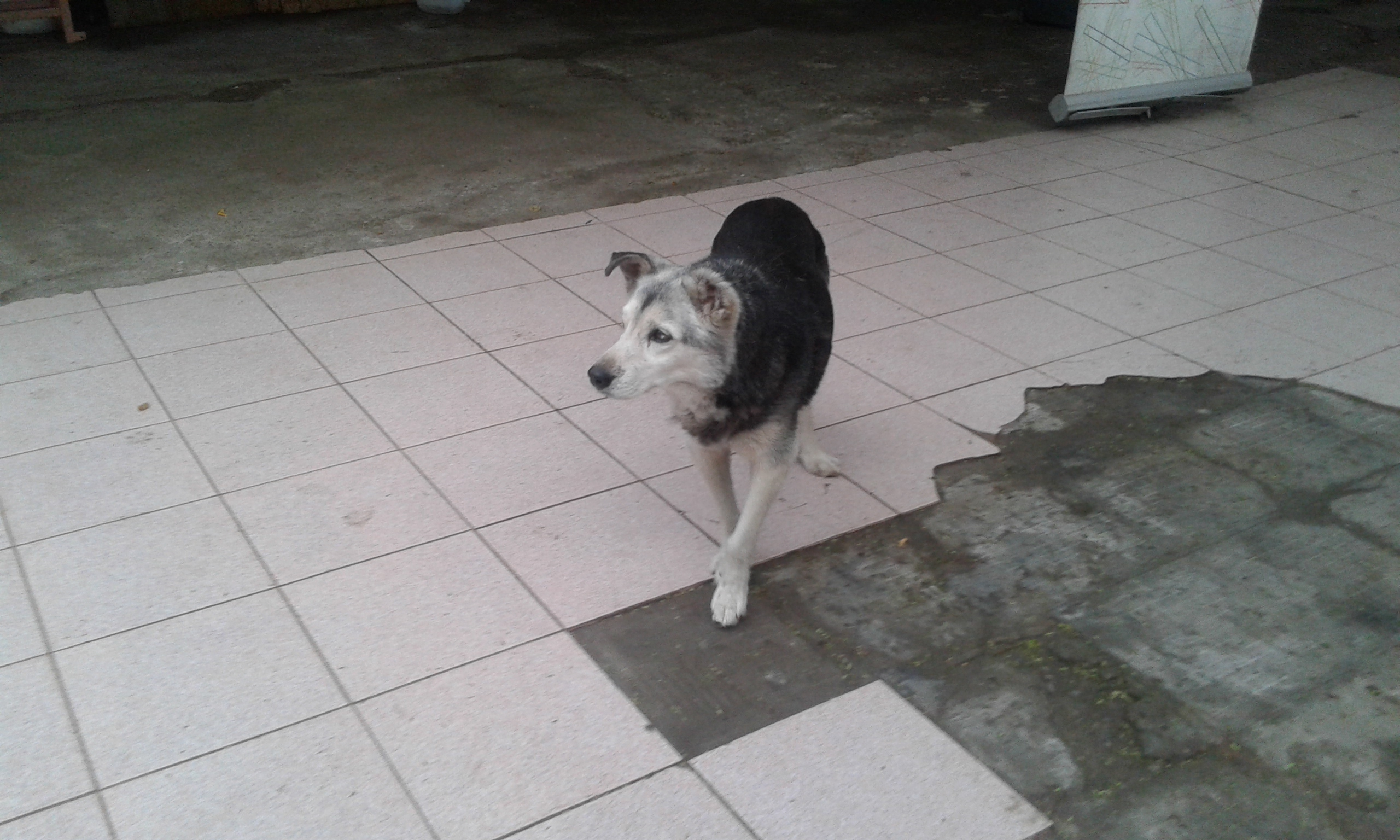 La foto de un buen perrito